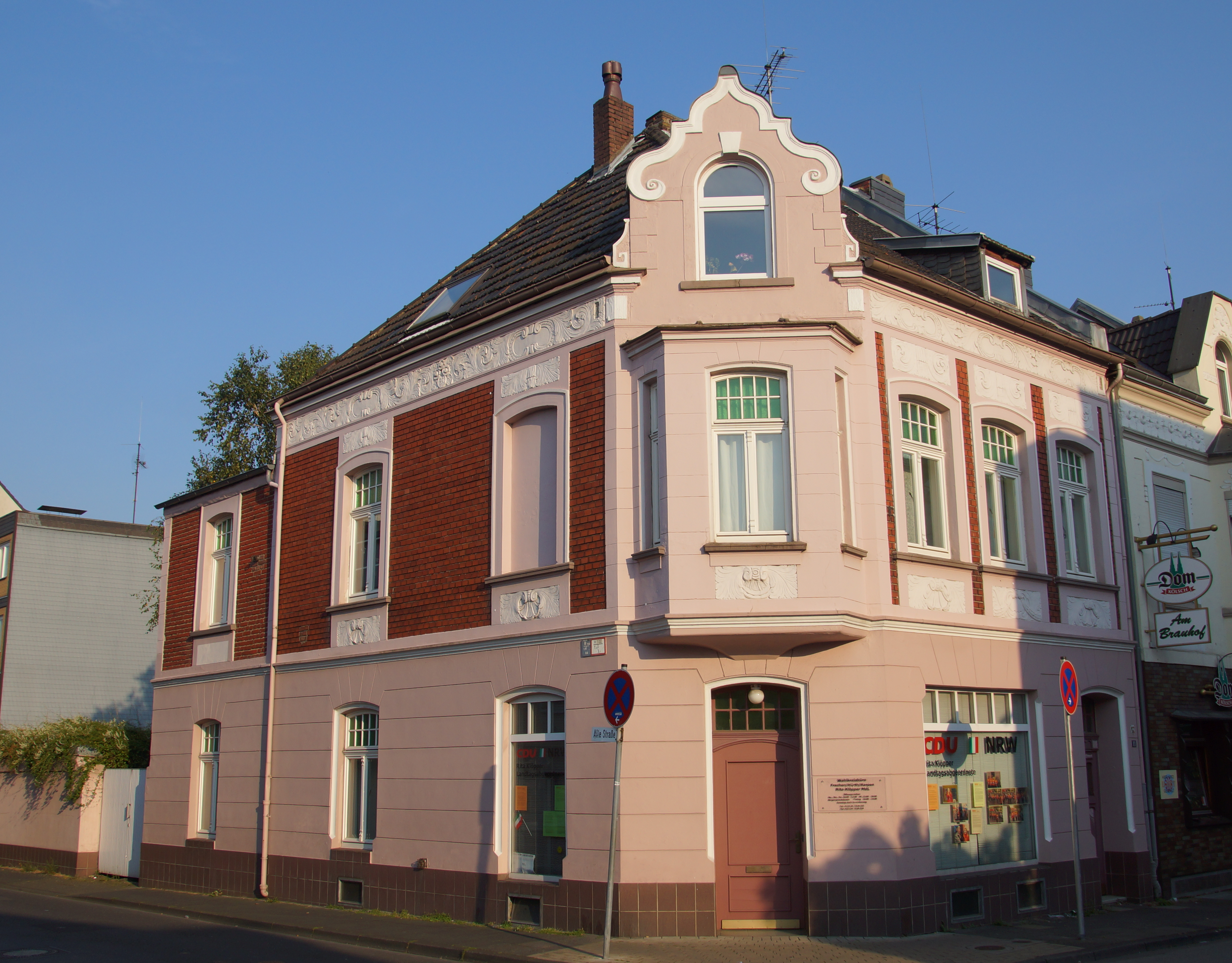 Baudenkmal Frechen, Keimesstr. 11, Gemarkung Frechen, Flur 35, Parz. 2063/575 This is a photograph of an architectural monument. 55